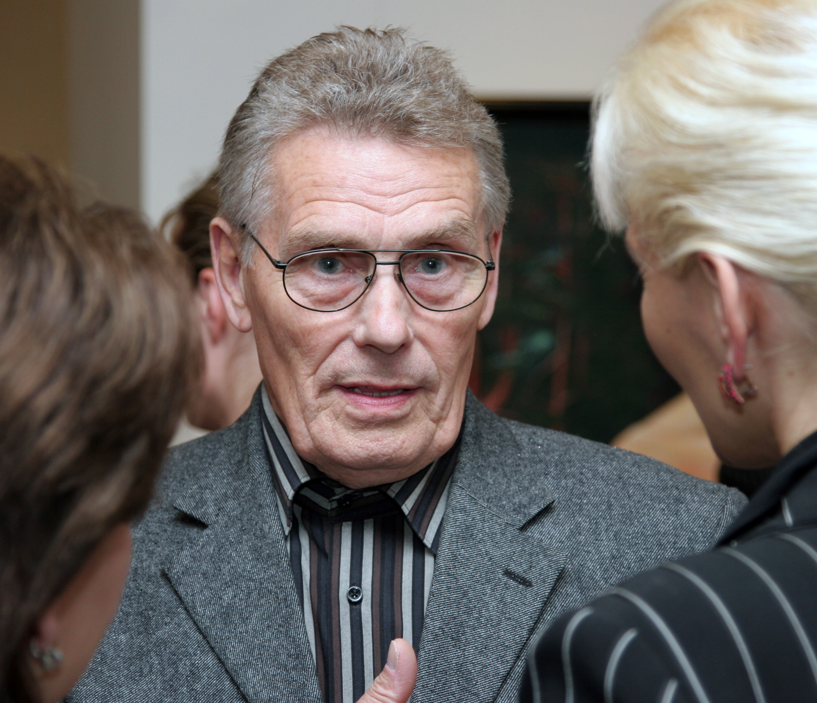 Olev Subbi, kunstnik 2006